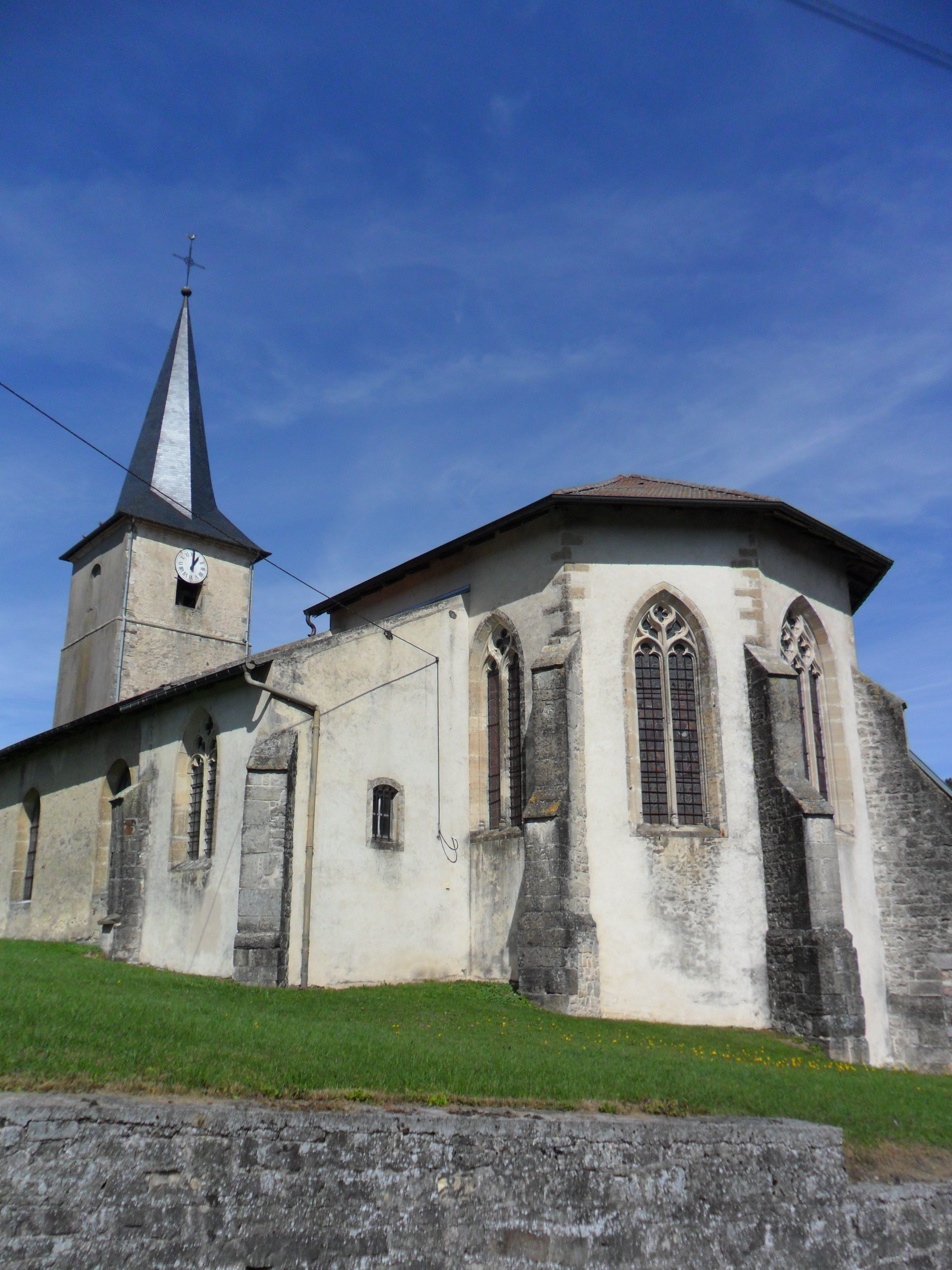 Eglise de Domjulien .